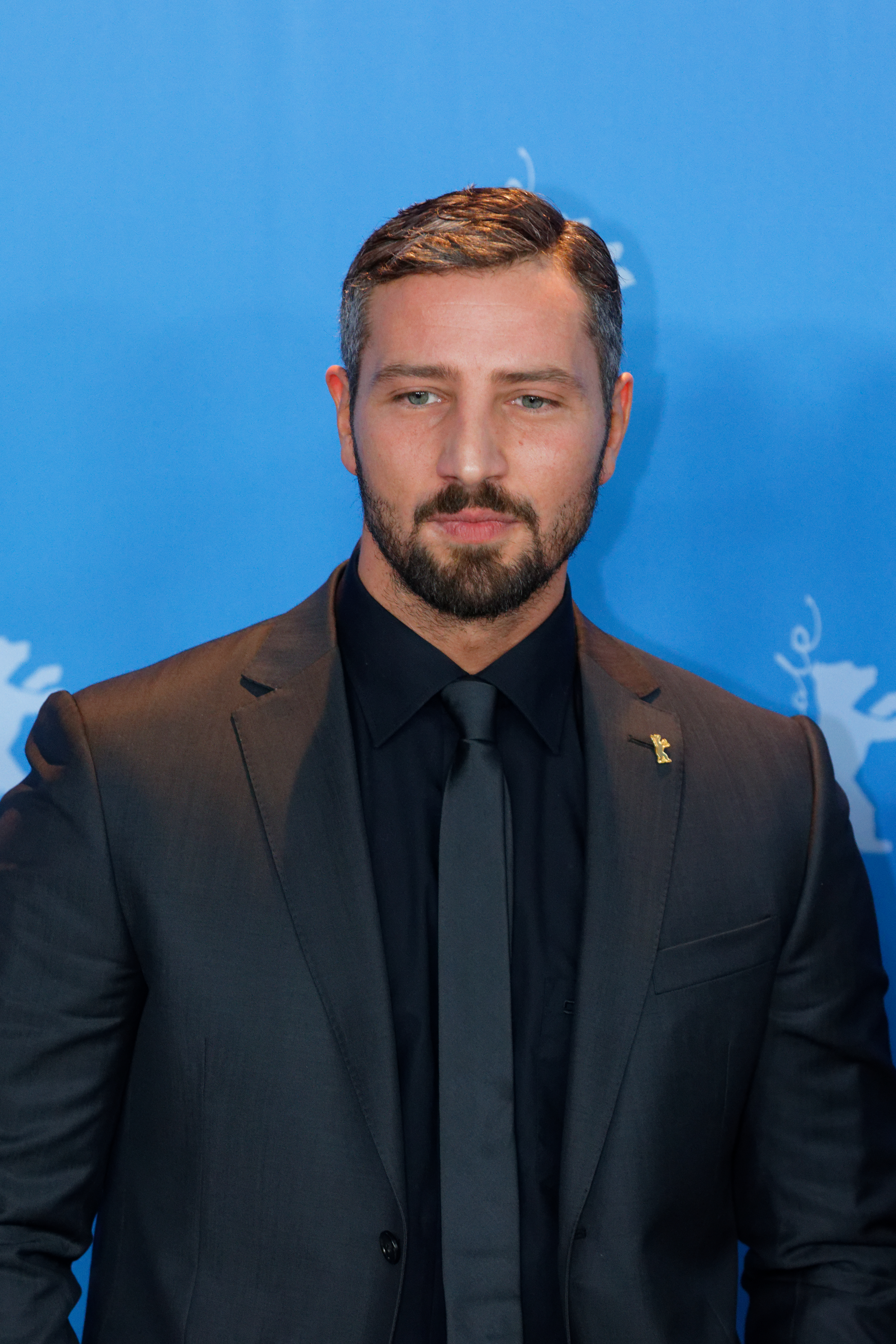 Murathan Muslu beim Photo Call zu Wilde Maus bei der Berlinale 2017